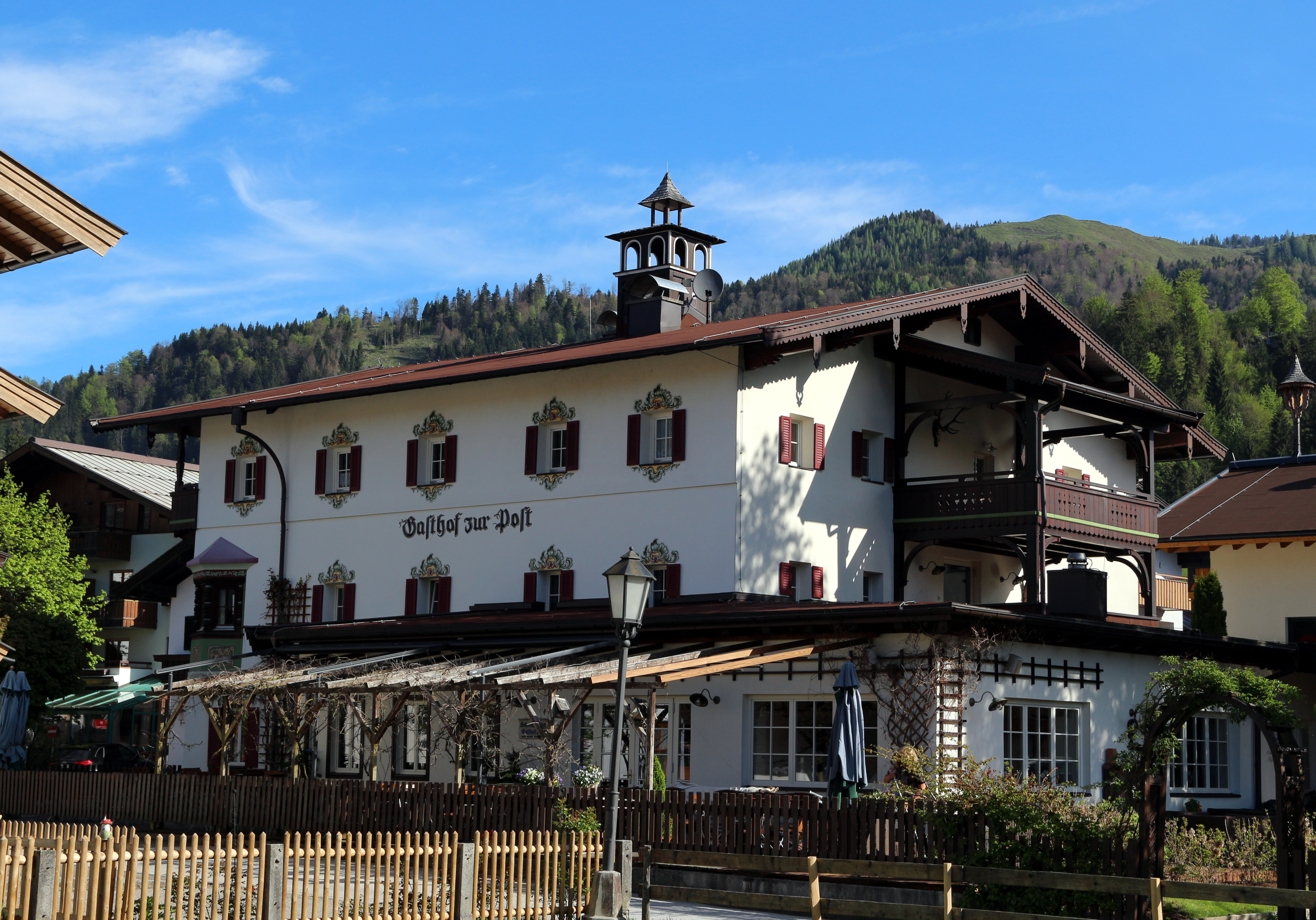 Gasthof zur Post in Kössen, Tirol. This media shows the remarkable cultural object in the Austrian state of Tyrol listed by the Tyrolean Art Cadastre with the ID 14122. (on tirisMaps, pdf, more images on Commons, Wikidata)